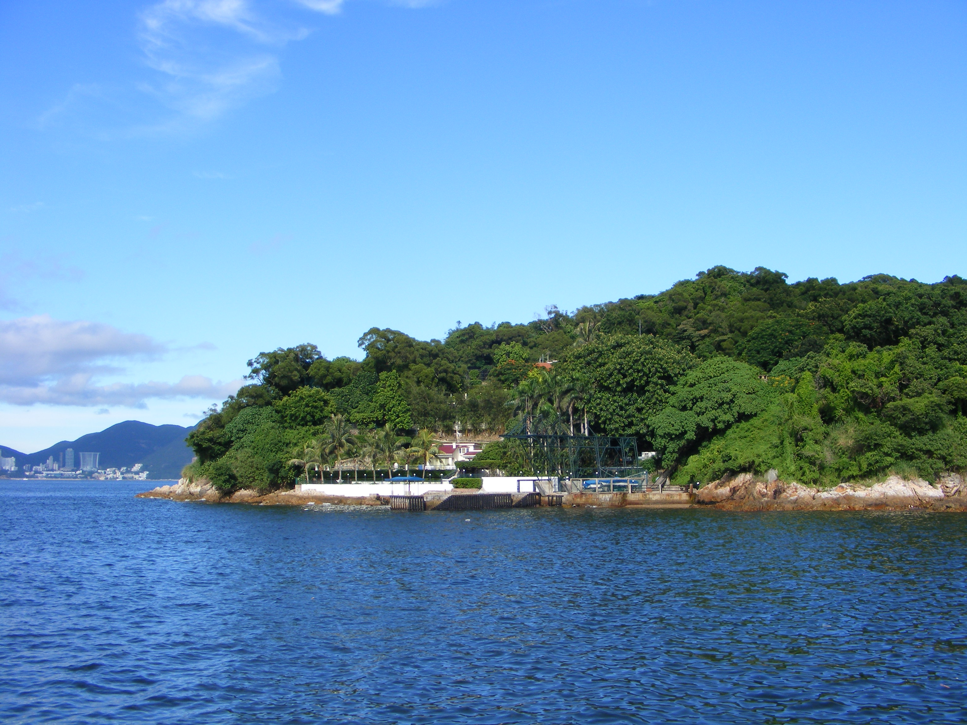 Hong Kong